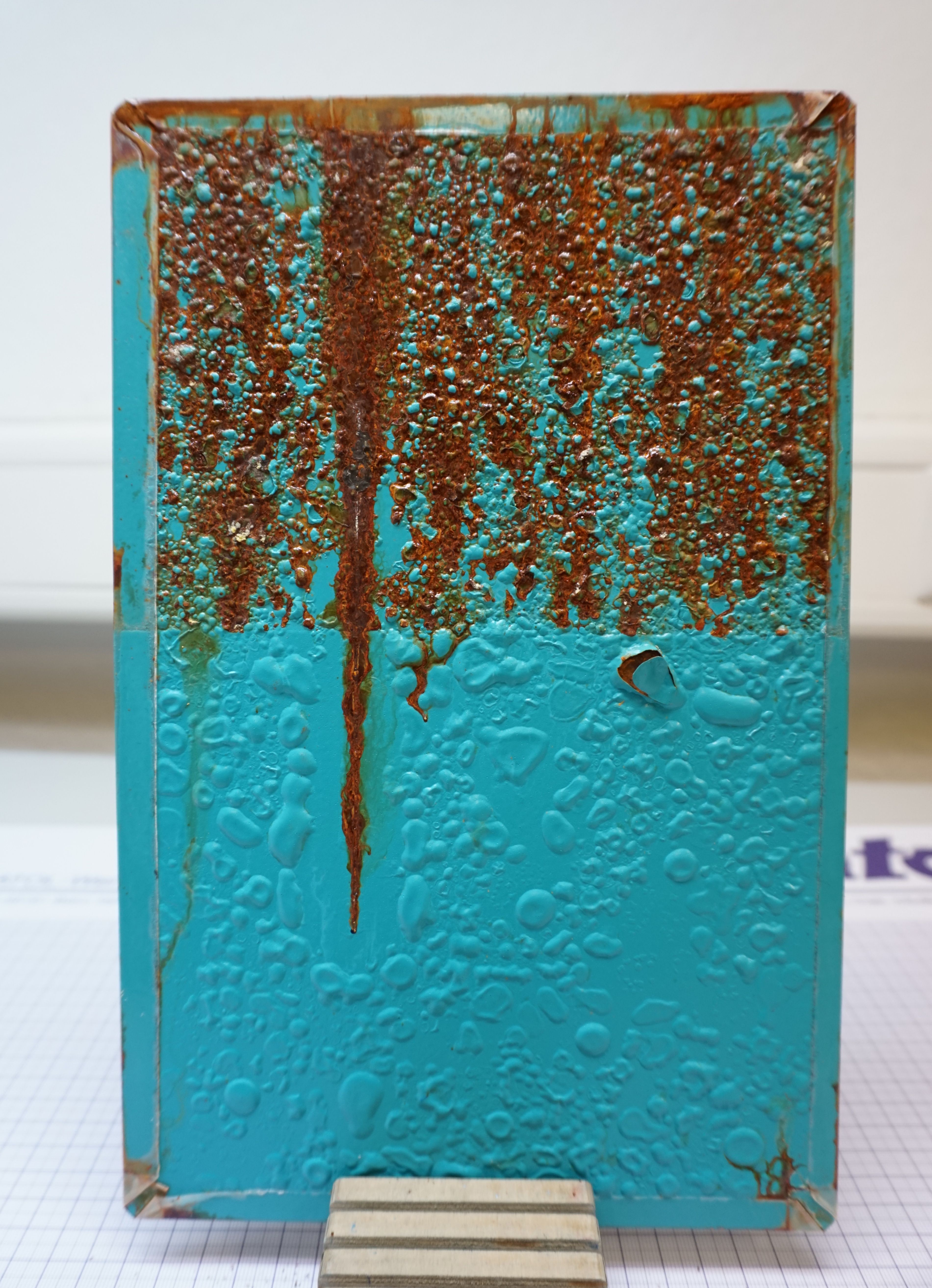 auf einem Blech, welches im Salzsprühtestgerät war, befinden sich deutliche Rostspuren